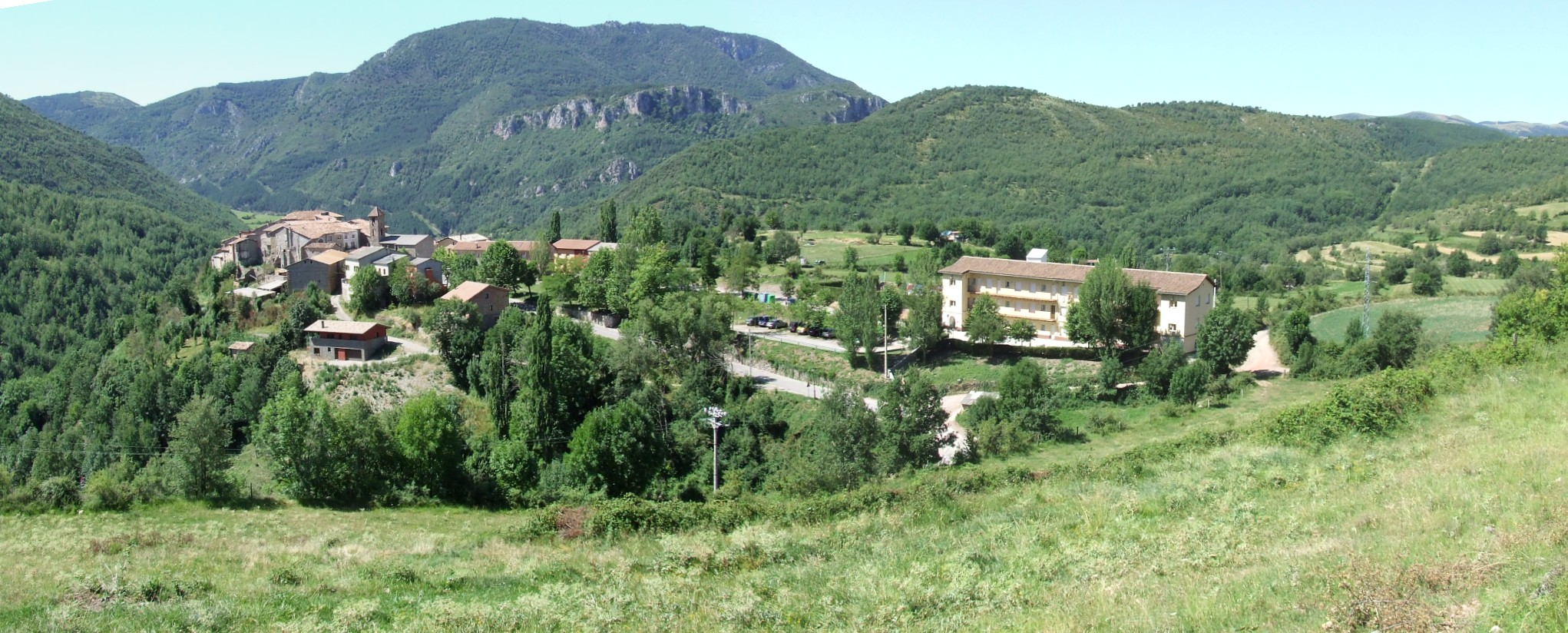 Malpàs i el seu entorn (El Pont de Suert, Alta Ribagorça)